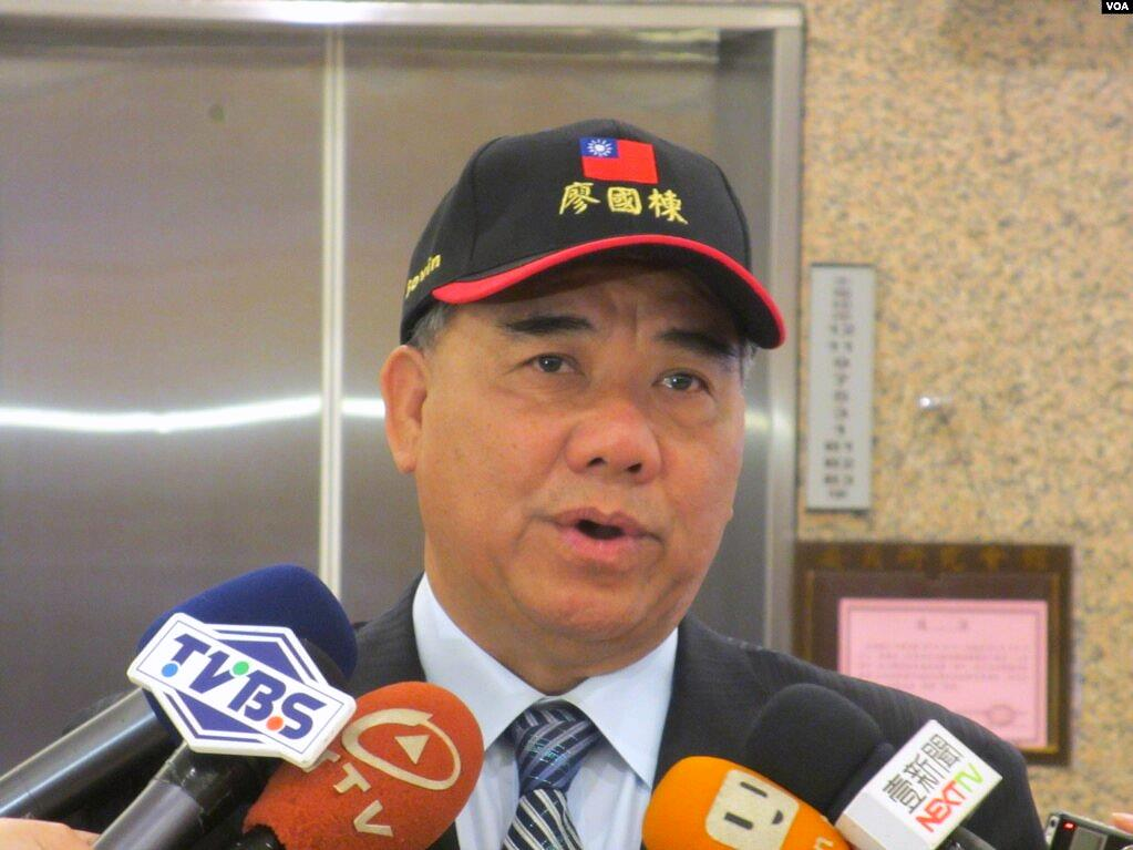 中文（台灣）: 台灣執政黨國民黨立委廖國棟